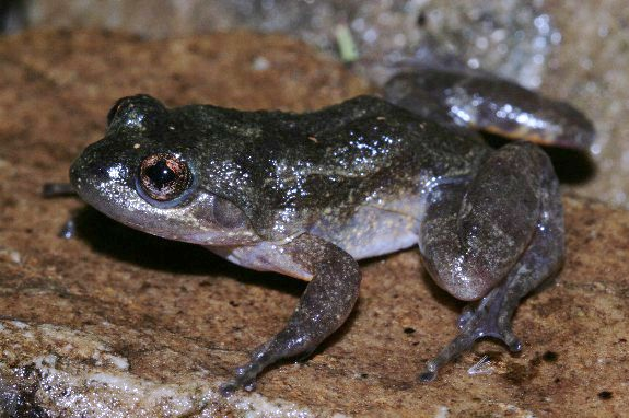 Mantidactylus pauliani Nouvelle version de Mantidactylus pauliani01.jpg : recadrage ; niveaux.